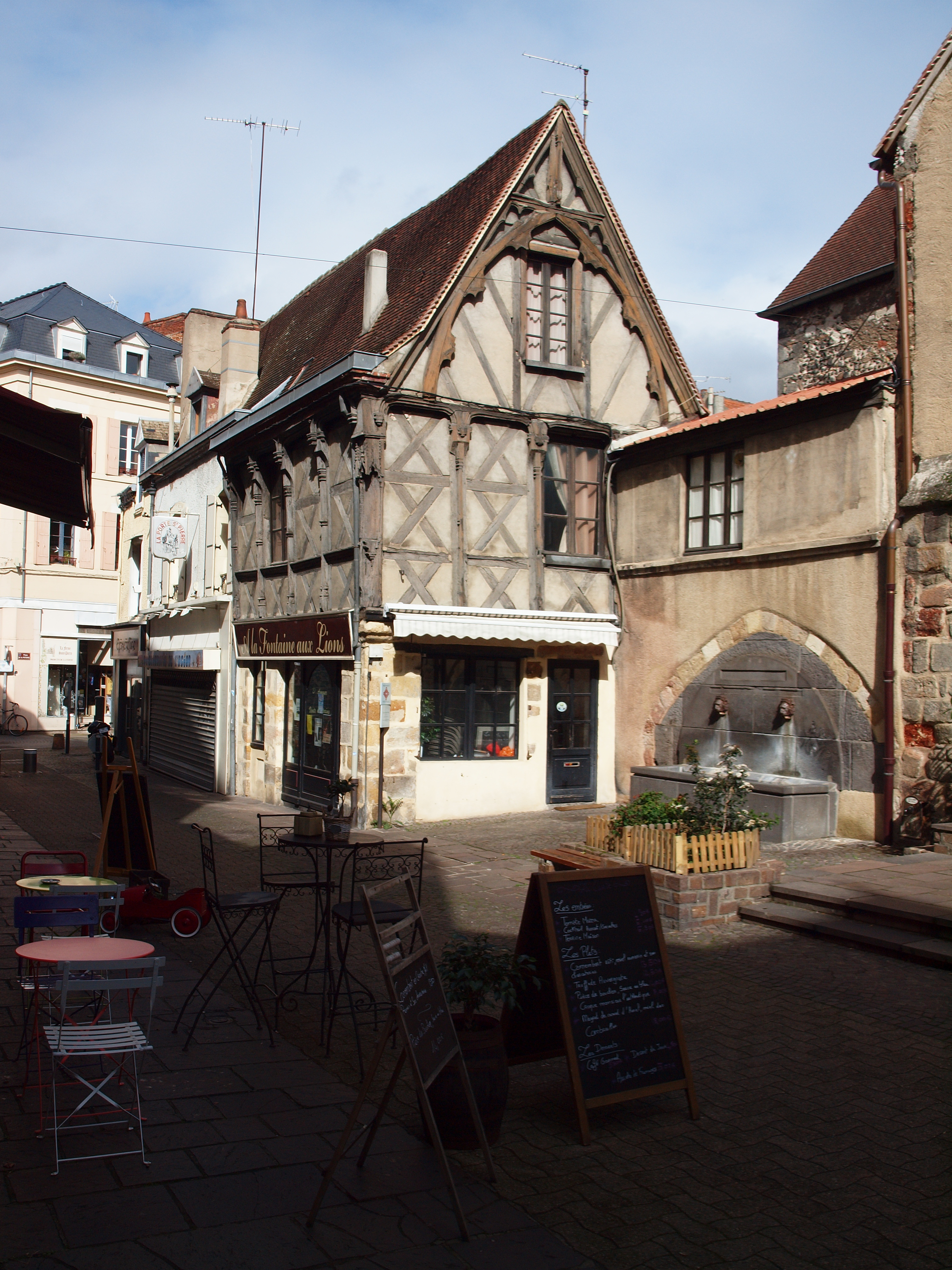 Fontaine aux lions à Montluçon (Allier, France)